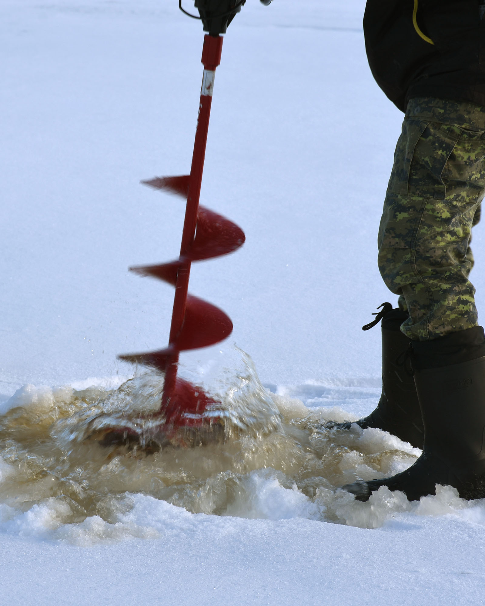 une activité organisé par l'éducation pour les jeunes du secondaire. une sortie qui dure 3 jours en forêt dans un camp.